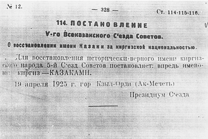 Постановление 5-го Всеказакского Сьезда о восстановлении имени казаки за киргизской национальностью